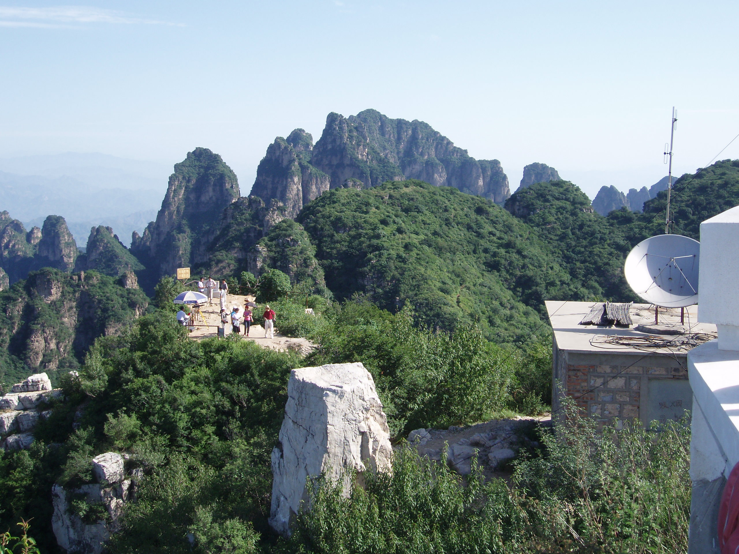 Langya mountain (狼牙山)